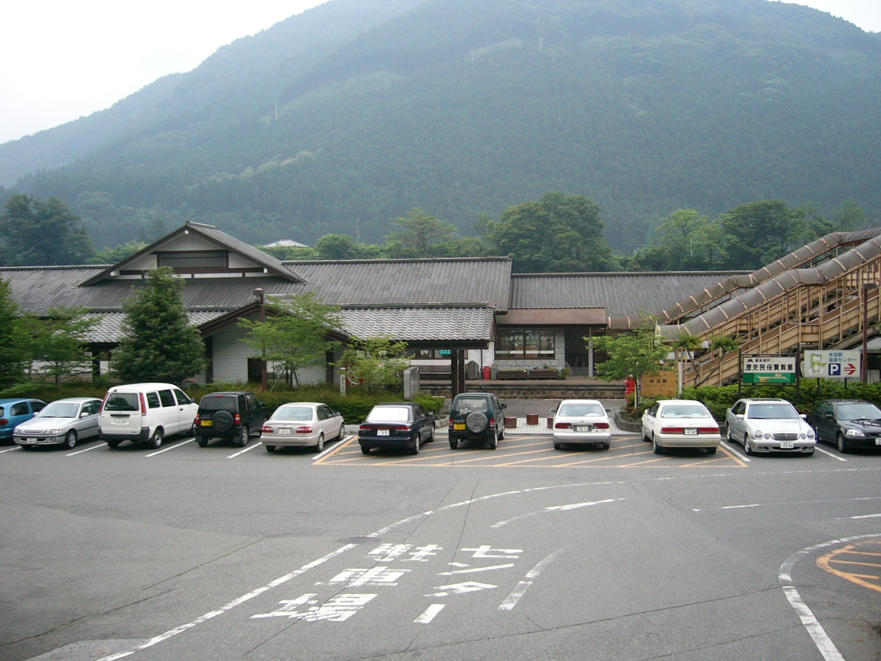 Mizunuma Station